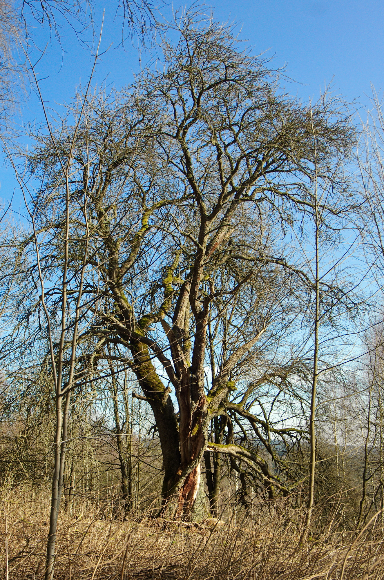 památný strom Zelenohorská hruška, Zelená Hora u Kraslic, okres Sokolov